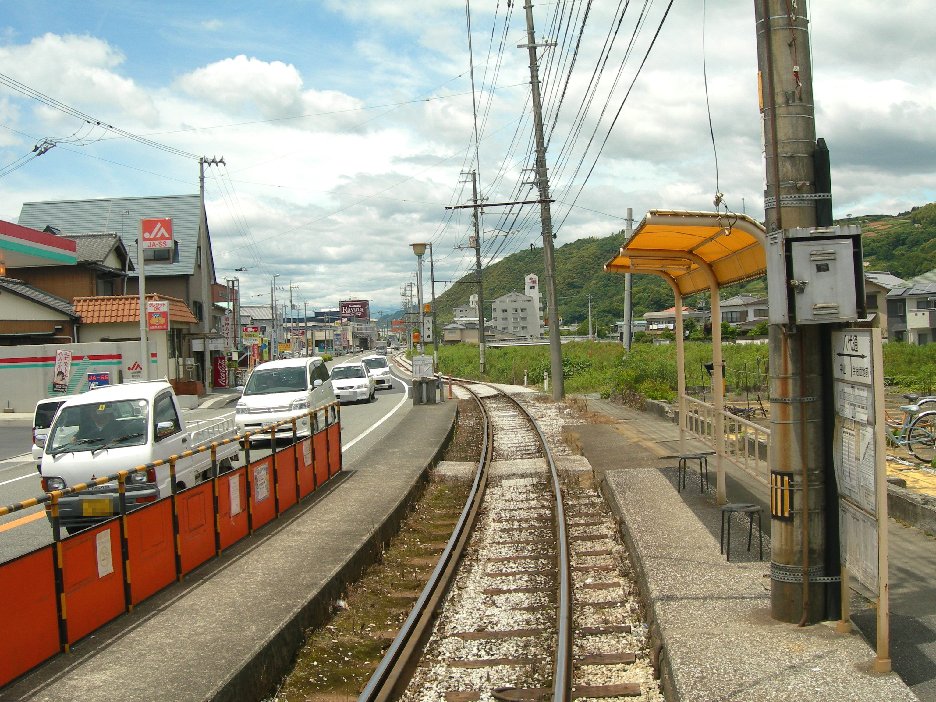 土佐電気鉄道八代通電停。